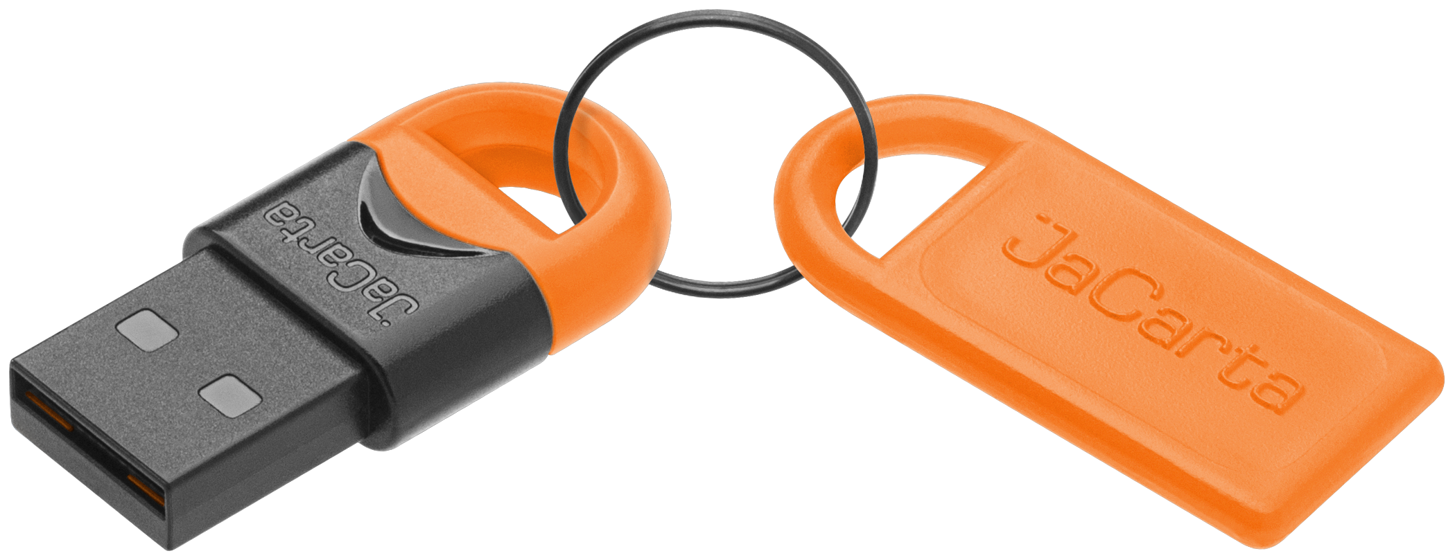 USB-токен для аутентификации от компании "Аладдин Р.Д."